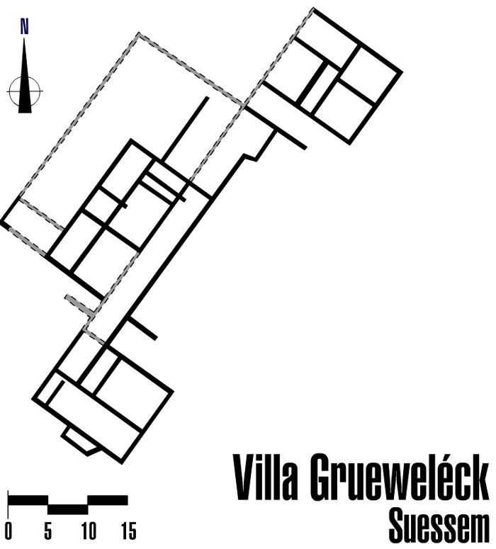 Plang vun der Réimervilla Grueweléck zu Suessem: Ze Bemierken ass, datt d'Gréissten an d'Wenkelen net 100% stëmmen, well d'Zeechnung sech u selwergemaache Fotoen an Loftopnahmen orientéiert. Suessem Kategorie:Gemeng Suessem